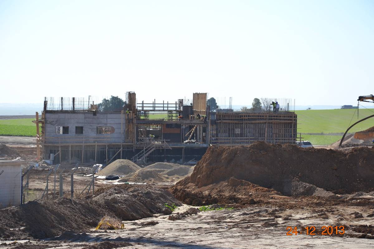 תחנת נתיבות בבנייה